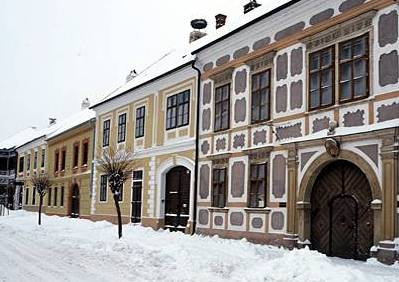 Staré domky v Rustu.